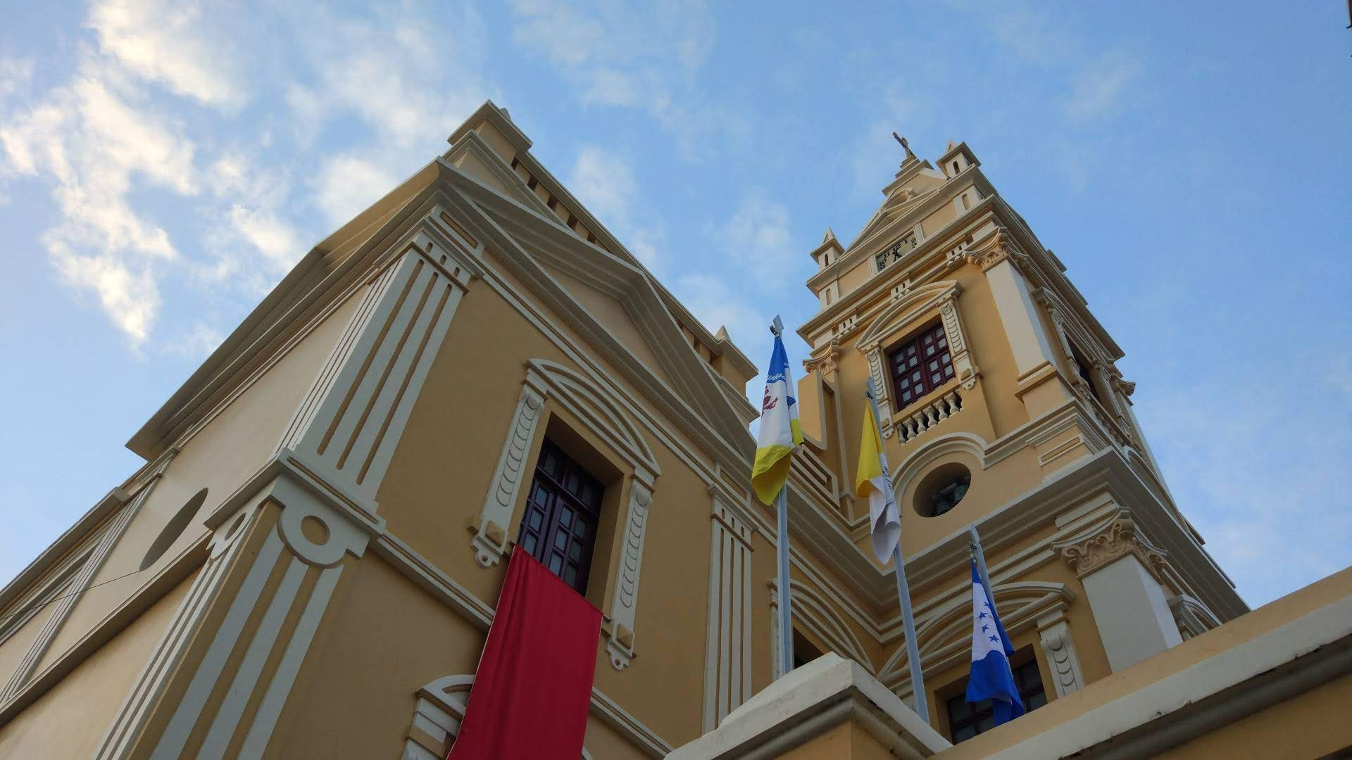 Catedral de Nossa Senhora com bandeiras do Vaticano, Diocese de Guarabira e da Paróquia de Nossa Senhora da Luz hasteadas por ocasião do Dia de Nossa Senhora da Luz.